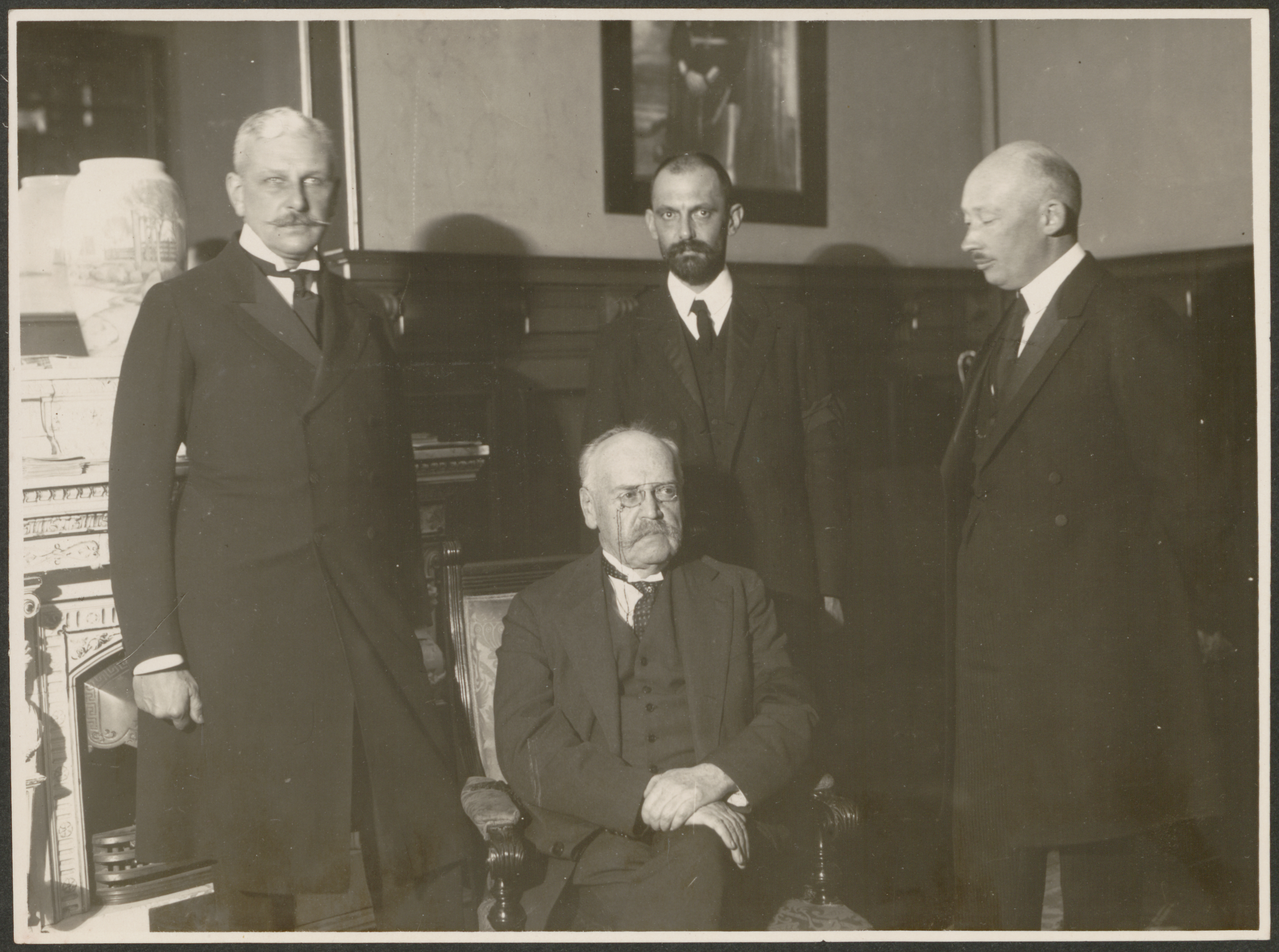 Fotografi af tidligere pager forsamlet i København ved bisættelsen af enkekejserinde Maria Fjodorovna (Dagmar) i 1928. På billedet ses siddende forrest: Alexander Feodorovitj Trepov -Трепов, Aлександр Феодоровиц, årgang 1880. Stående fra venstre mod højre: Sergej Nikolajevitj Pototskij - Потоццкий, Сергей Николаевиц, årgang 1896. Sergej Valerjanovitj Melnitskij - Мелницкий, Сергей Валеряновиц, årgang 1906 Sergej Sergejevitj Lodysjenskij - Лолженский, Сергей Сергеэвиц, årgang 1906 Fra Gudim-Levkovitj' Samling, Tøjhusmuseet.